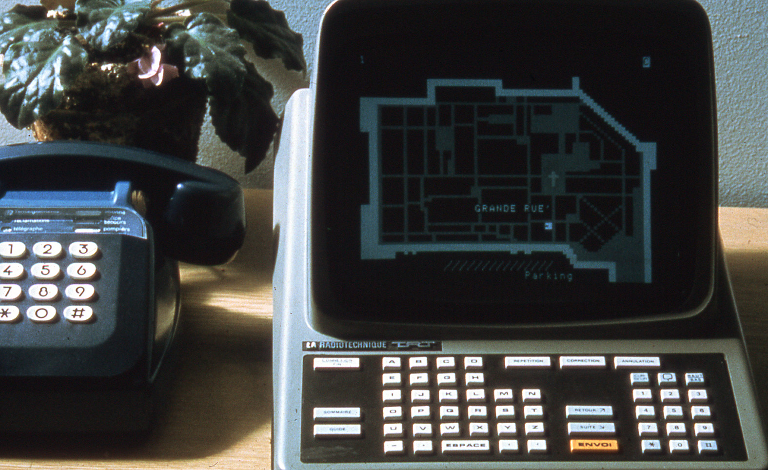 Équipement utilisé à l'ouverture de l'expérimentation Annuaire Électronique à Saint Malo en Juillet 1980